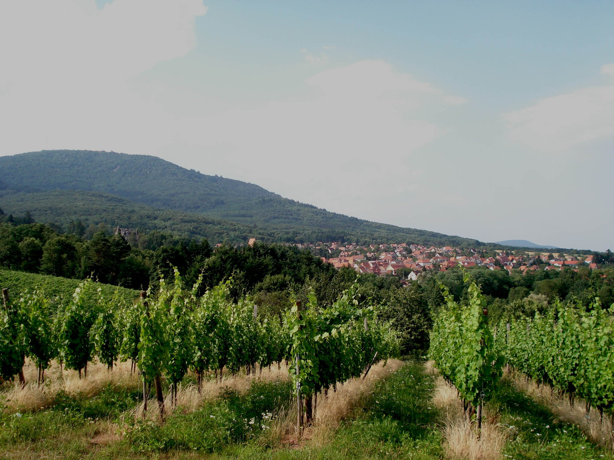 Wattwiller vue d'ensemble depuis le Nodelberg